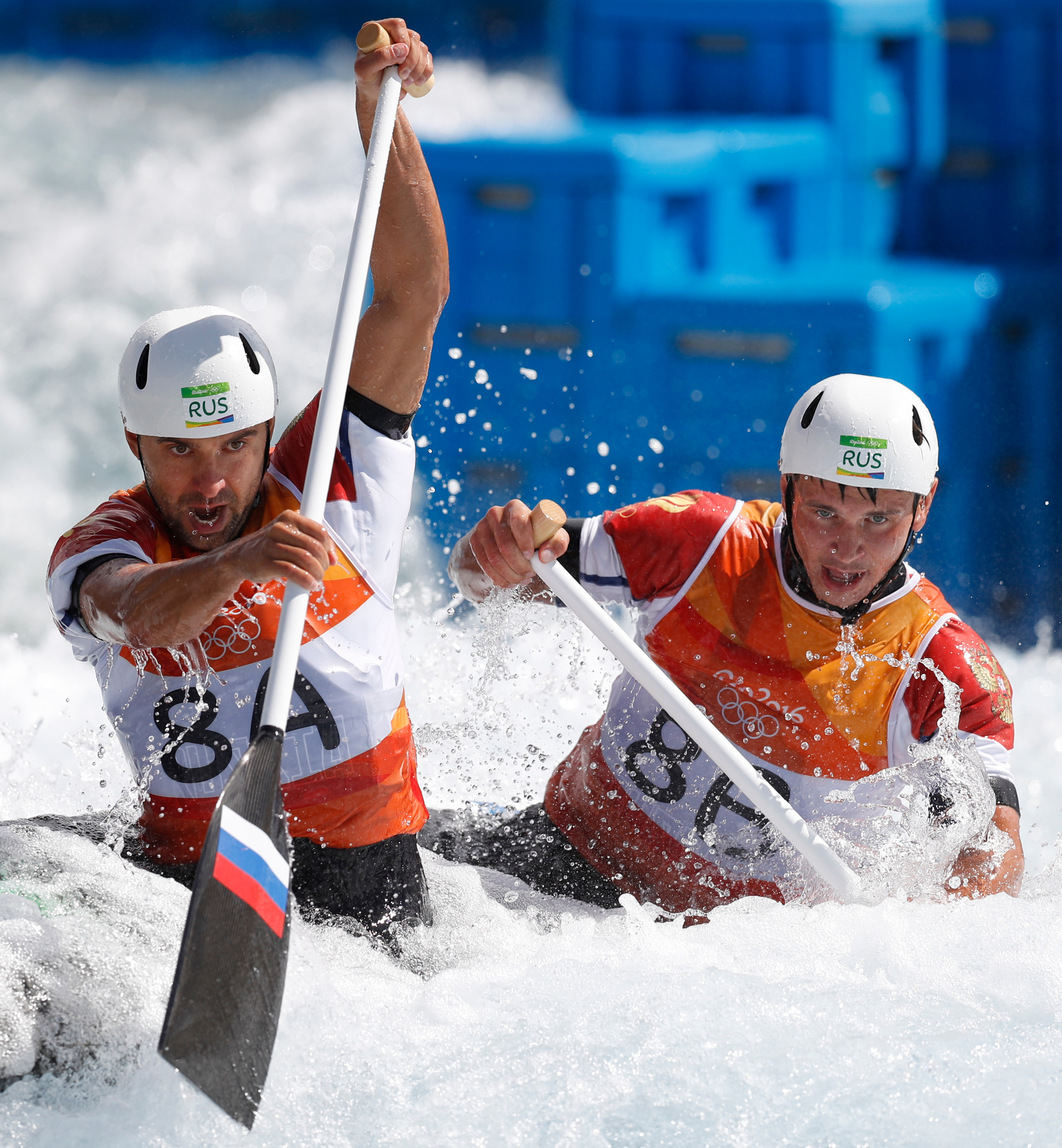 Rio de Janeiro - Russos Mikhail Kuznetsov e Dmitry Larionov disputam canoagem slalom categoria C2 nos Jogos Olímpicos Rio 2016 no X Park em Deodoro (Fernando Frazão/Agência Brasil)